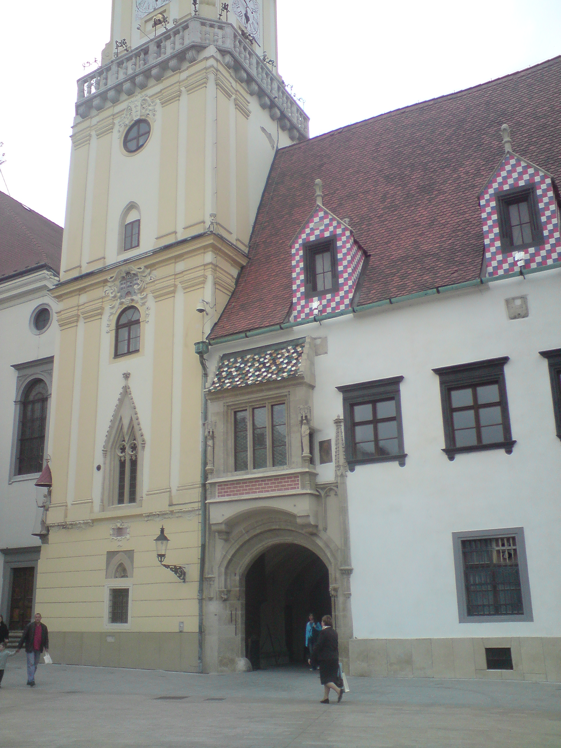 Stará radnica, Bratislava